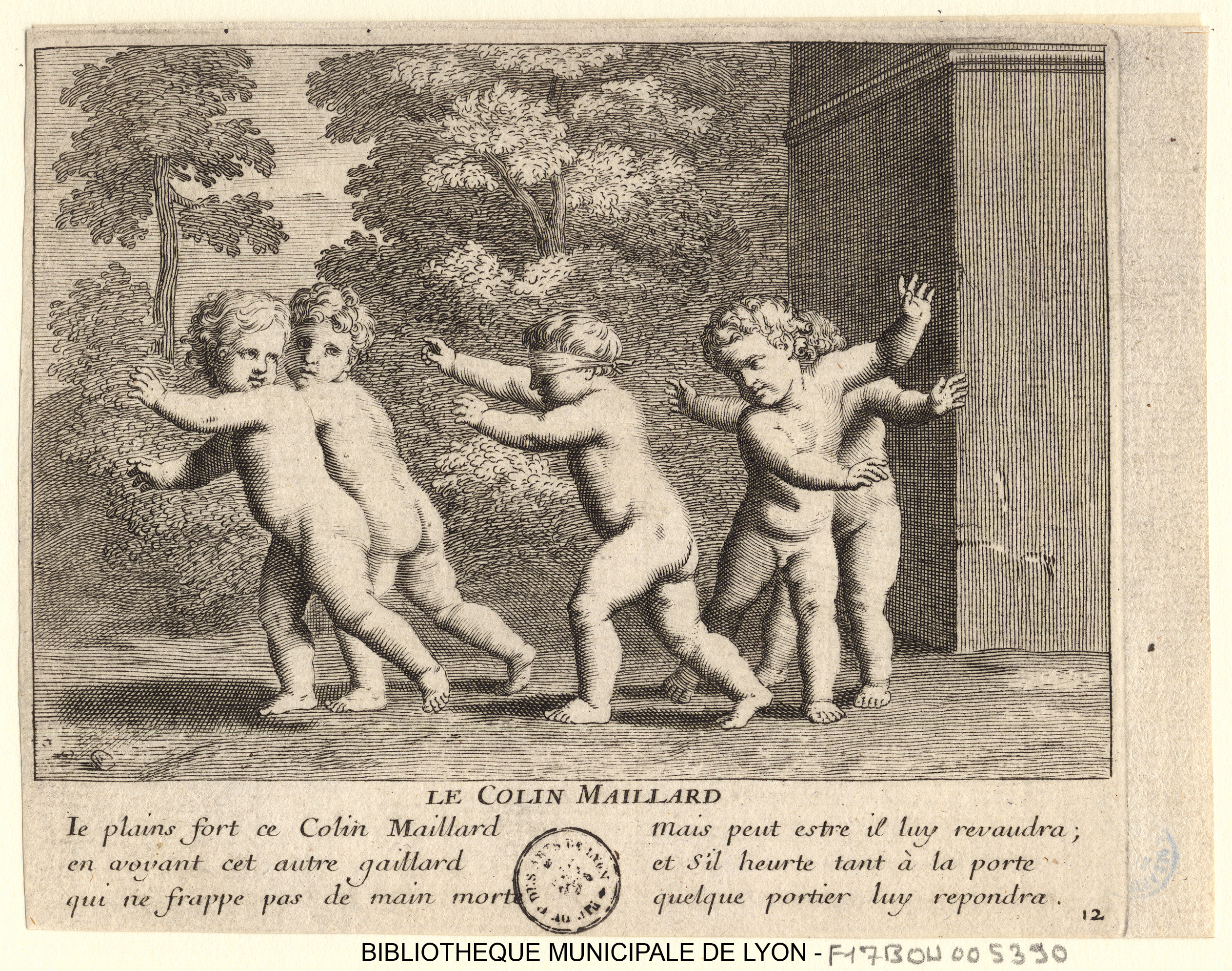 Jeux d'enfants